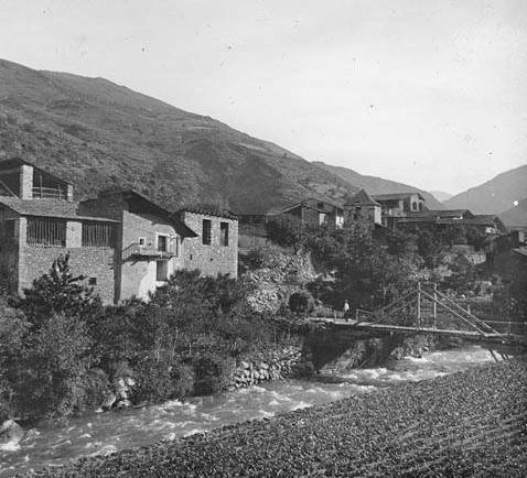 Vista parcial d'Anserall amb el riu Valira i un pont. Frederic Bordas i Altarriba (1882)